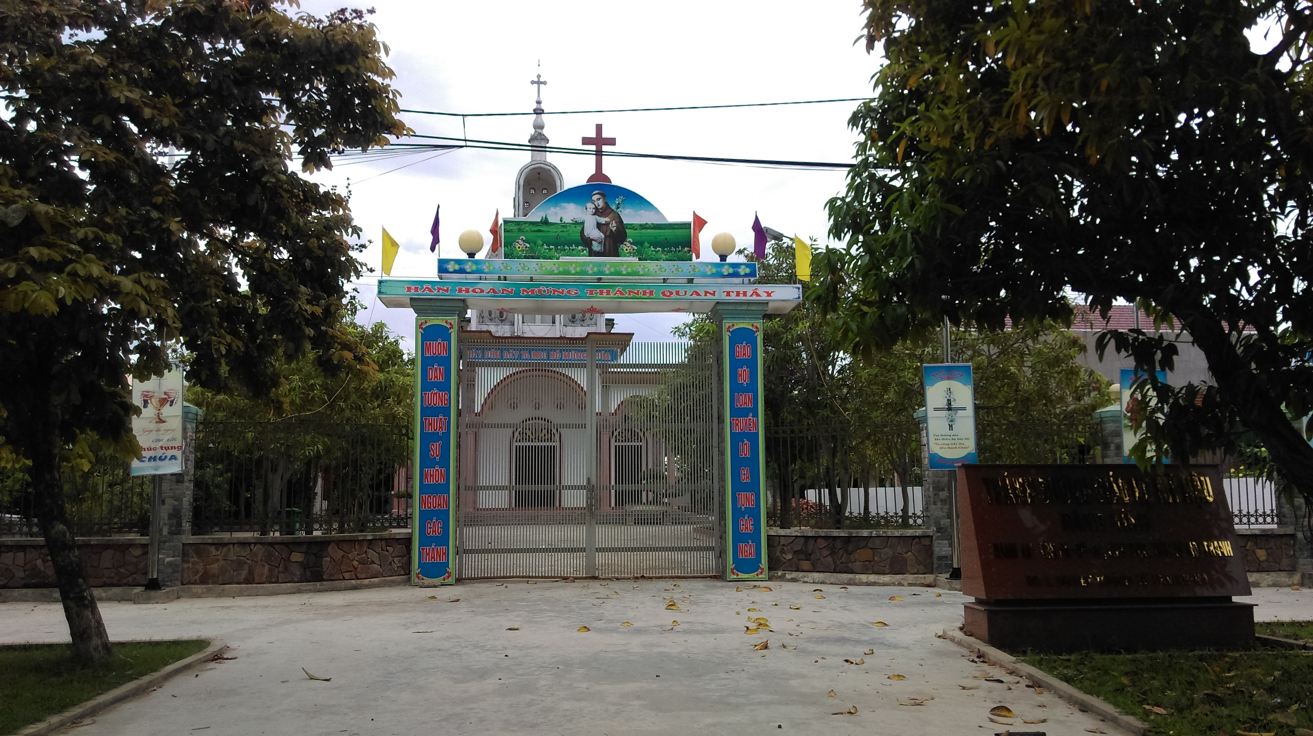 Nhà thờ Mỹ Hậu, Hưng Đông, Vinh, Nghệ An